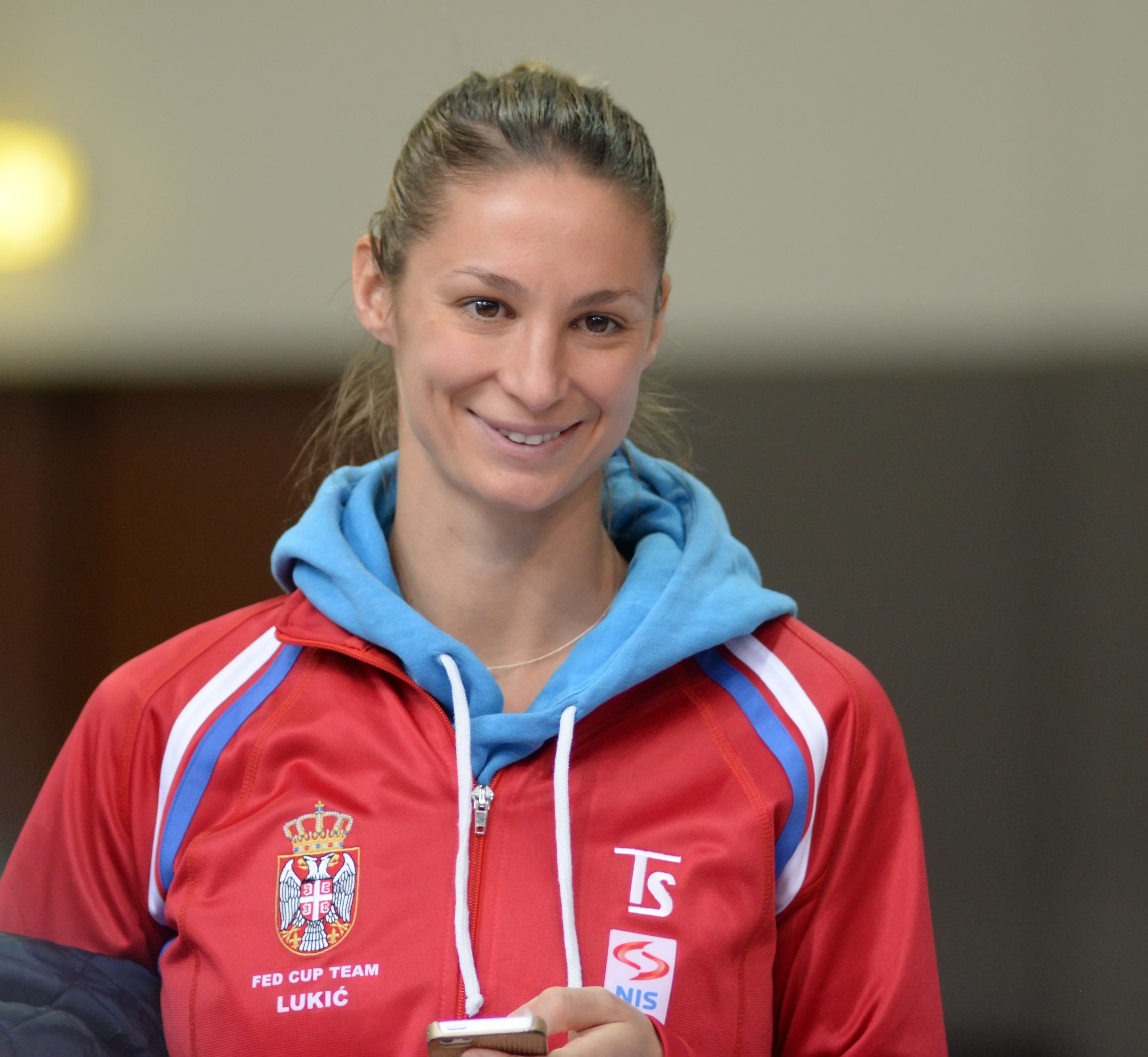 Vojislava Lukić at the 2015 Fed Cup